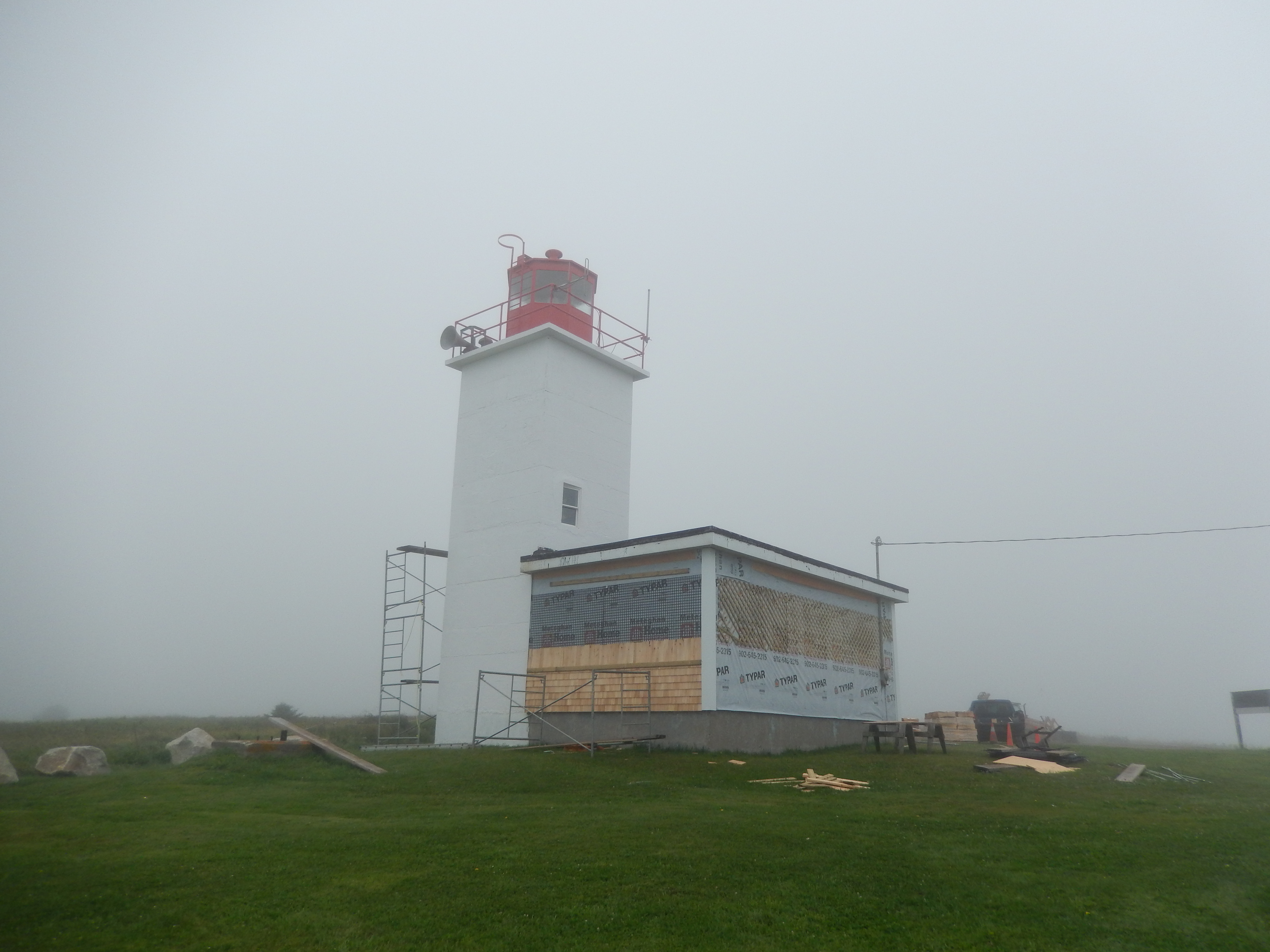 Phare du cap Sainte-Marie en Clare (Nouvelle-Écosse)